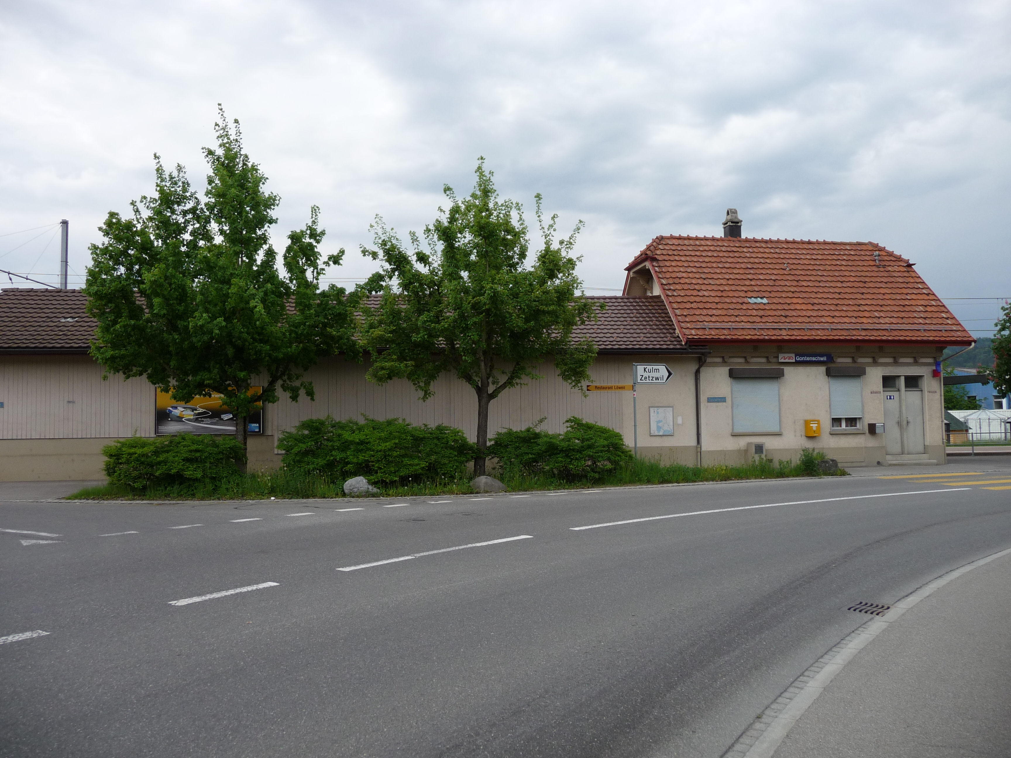 Bahnhofsgebäude in Gontenschwil